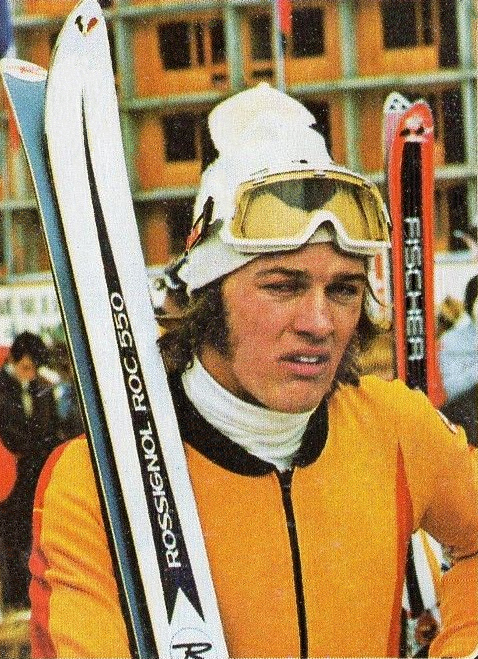 CAMPIONI dello SPORT 1973/74-Figurina n.336- RUSSI - SVIZZERA